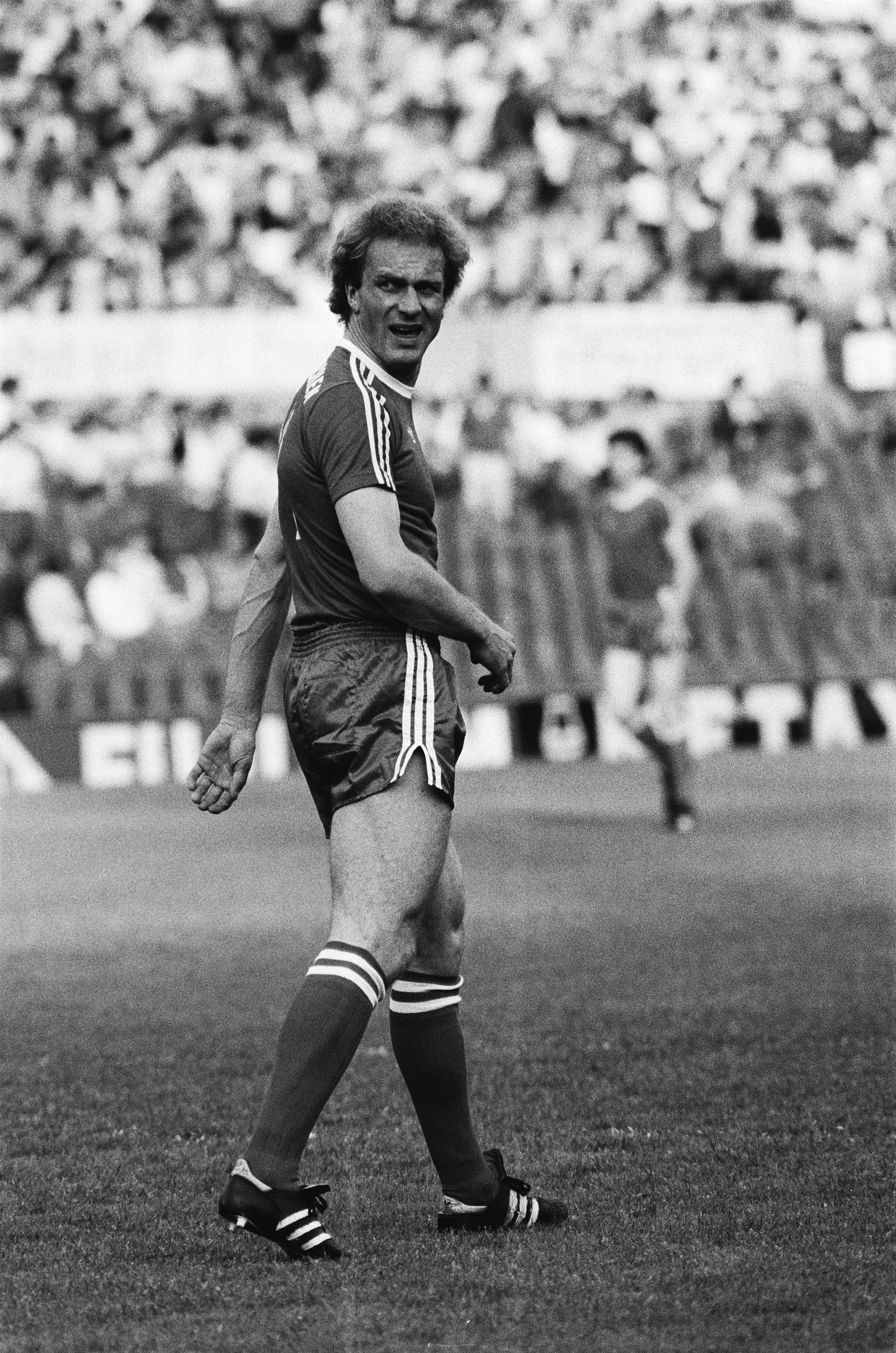 Collectie / Archief : Fotocollectie Anefo Reportage / Serie : [ onbekend ] Beschrijving : FC Bayern Munchen tegen Aston Villa 0-1 Europa Cup I Rummennige in aktie Datum : 26 mei 1982 Trefwoorden : sport, voetbal Persoonsnaam : Aston Villa, Fc Bayern Munchen Fotograaf : Antonisse, Marcel / Anefo Auteursrechthebbende : Nationaal Archief Materiaalsoort : Negatief (zwart/wit) Nummer archiefinventaris : bekijk toegang 2.24.01.05 Bestanddeelnummer : 932-1815